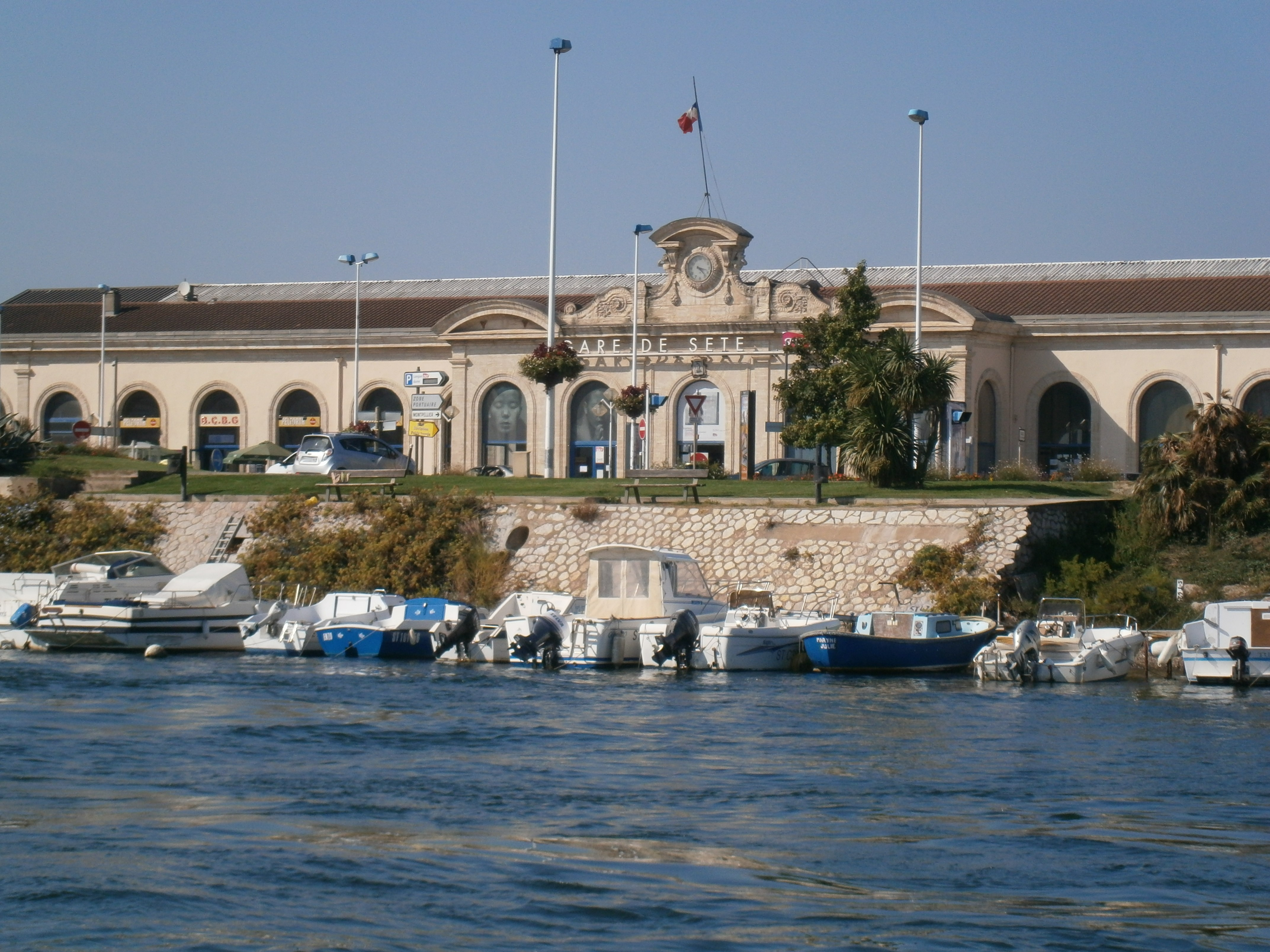 Gare de Sète (34) : Le bâtiment voyageurs.